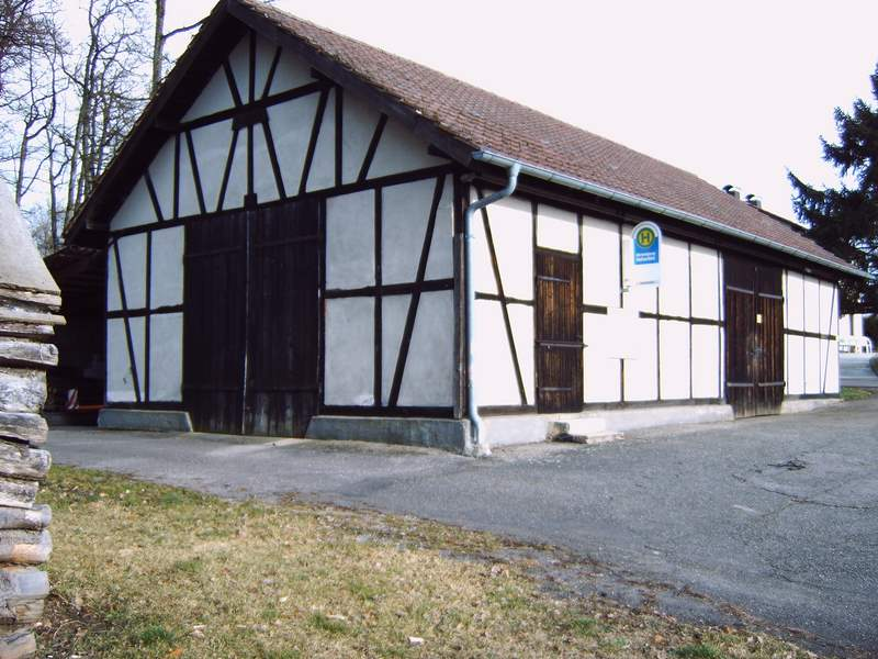 Typischer Armierungsschuppen der Neckar-Enz-Stellung in Gundelsheim